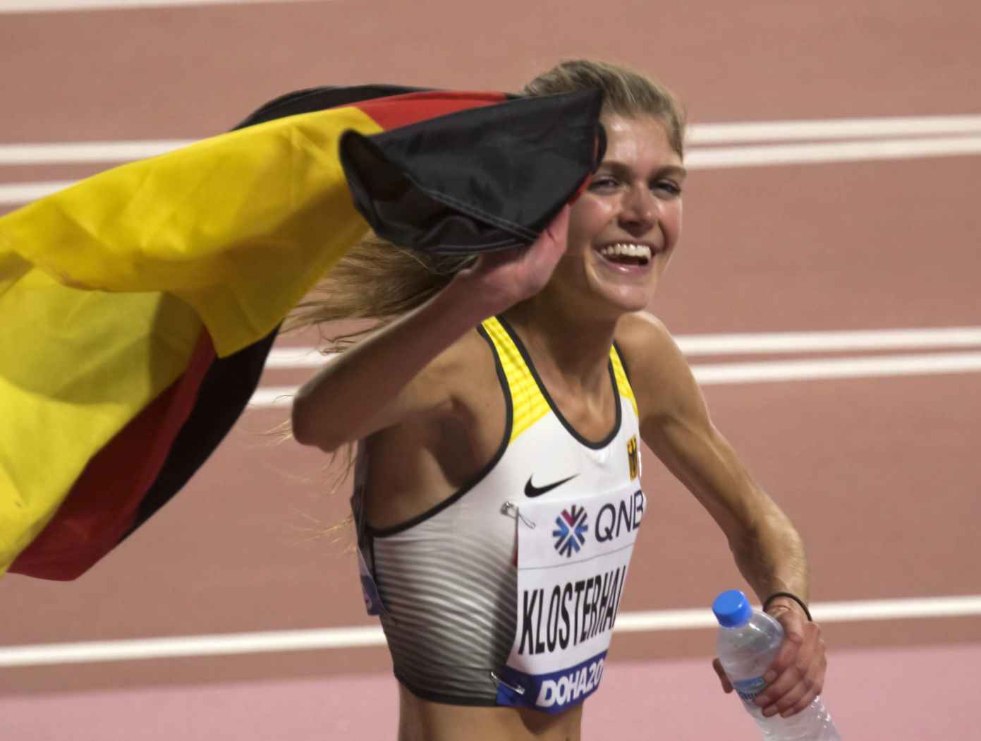 DOH80478 5000m women klosterhalfen